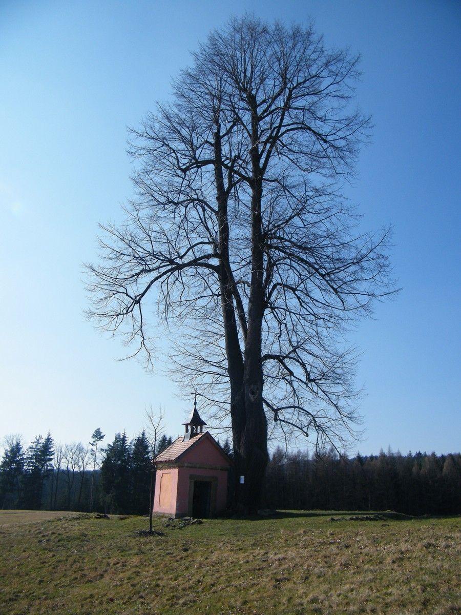 Kaple Nejsvětější Trojice v Doubici